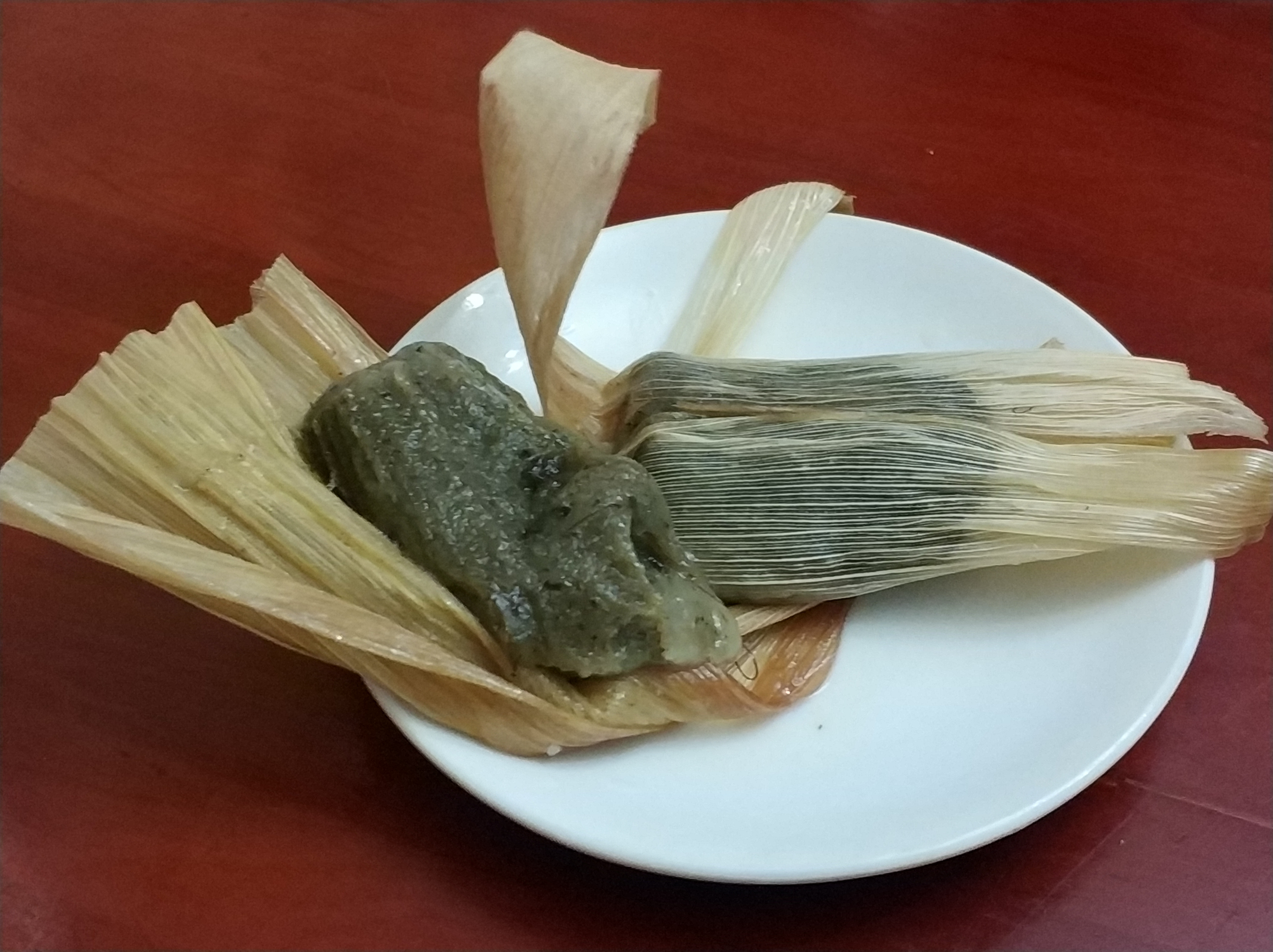 中文（中国大陆）: 成都市新都区新繁叶儿粑吧